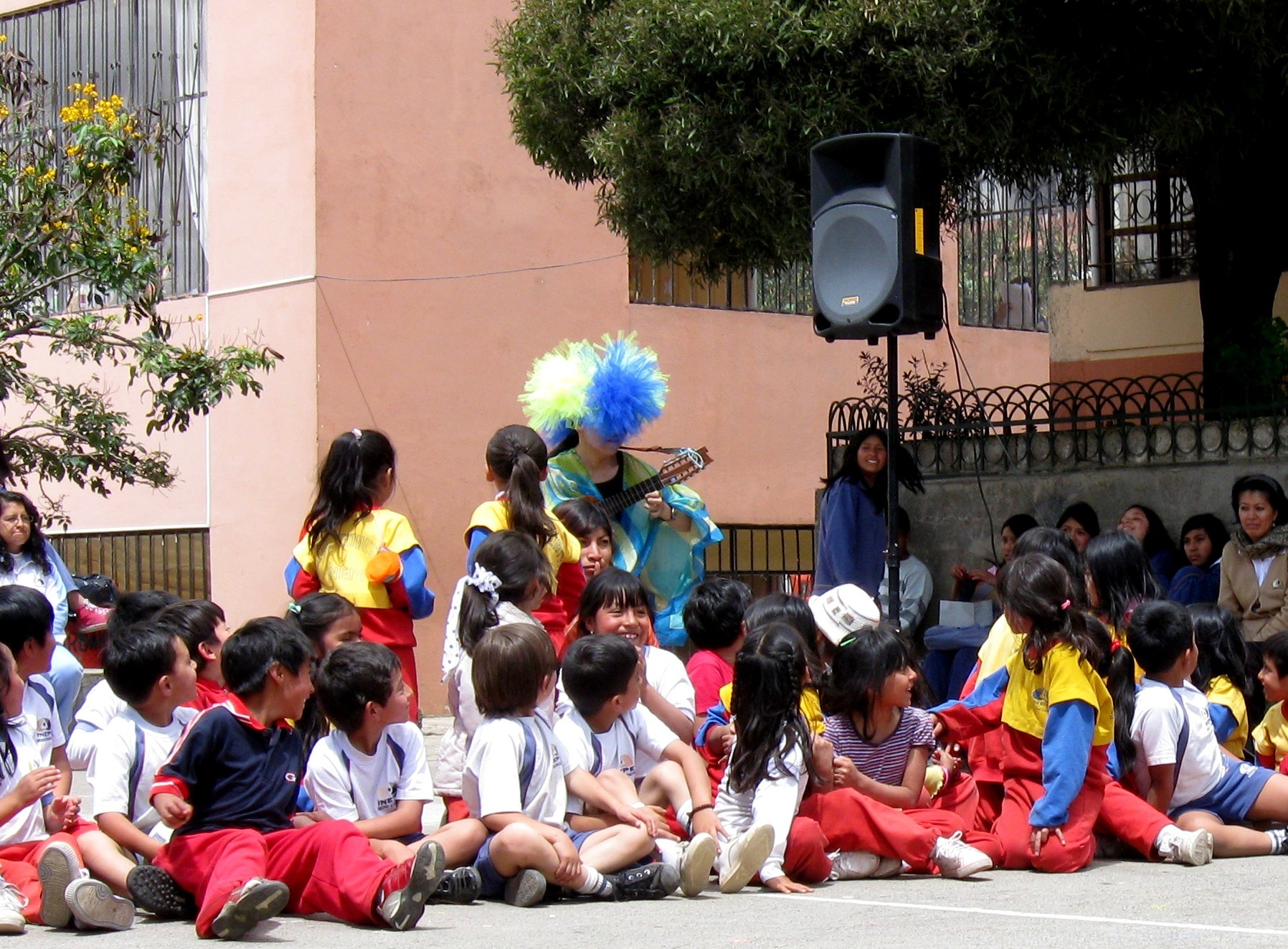 Encuentro Cultural / Danza del Colibri en escuela de Quito 2010